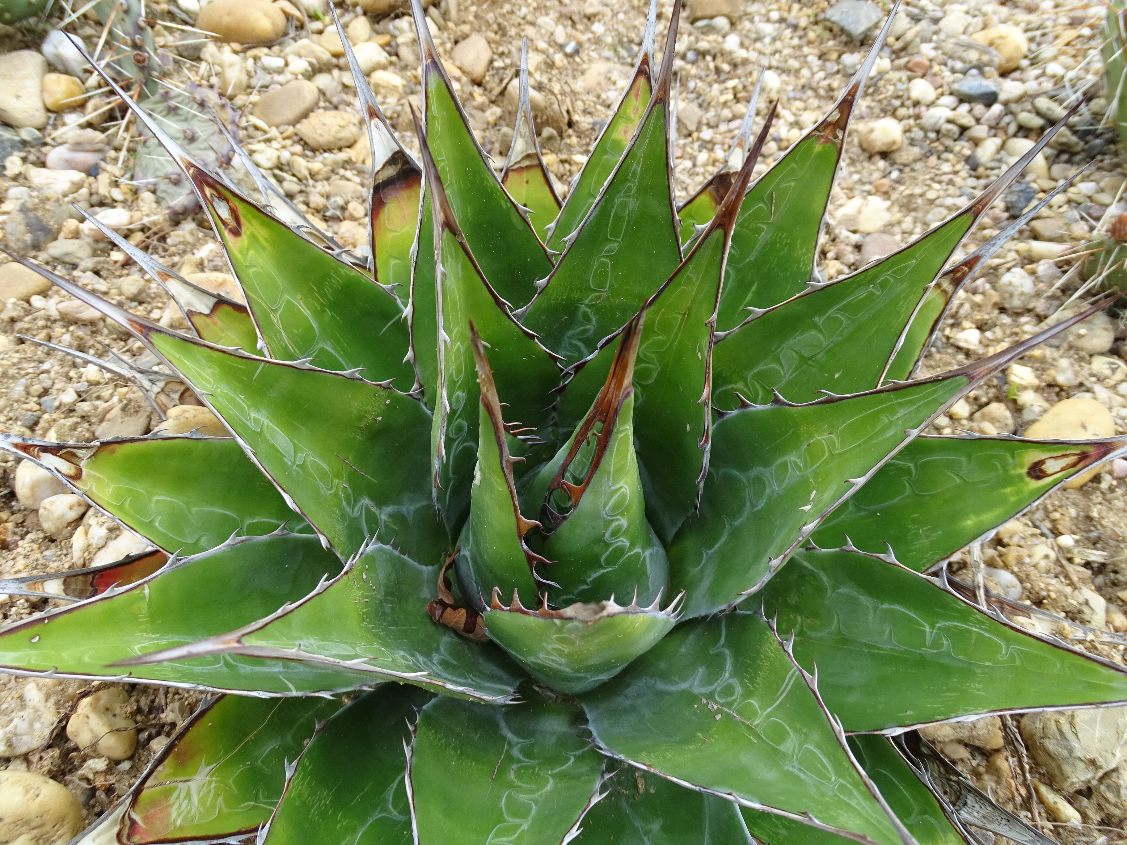 Botanická zahrada Praha